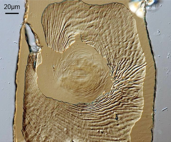 Meloidogyne incognita male, perineal pattern.